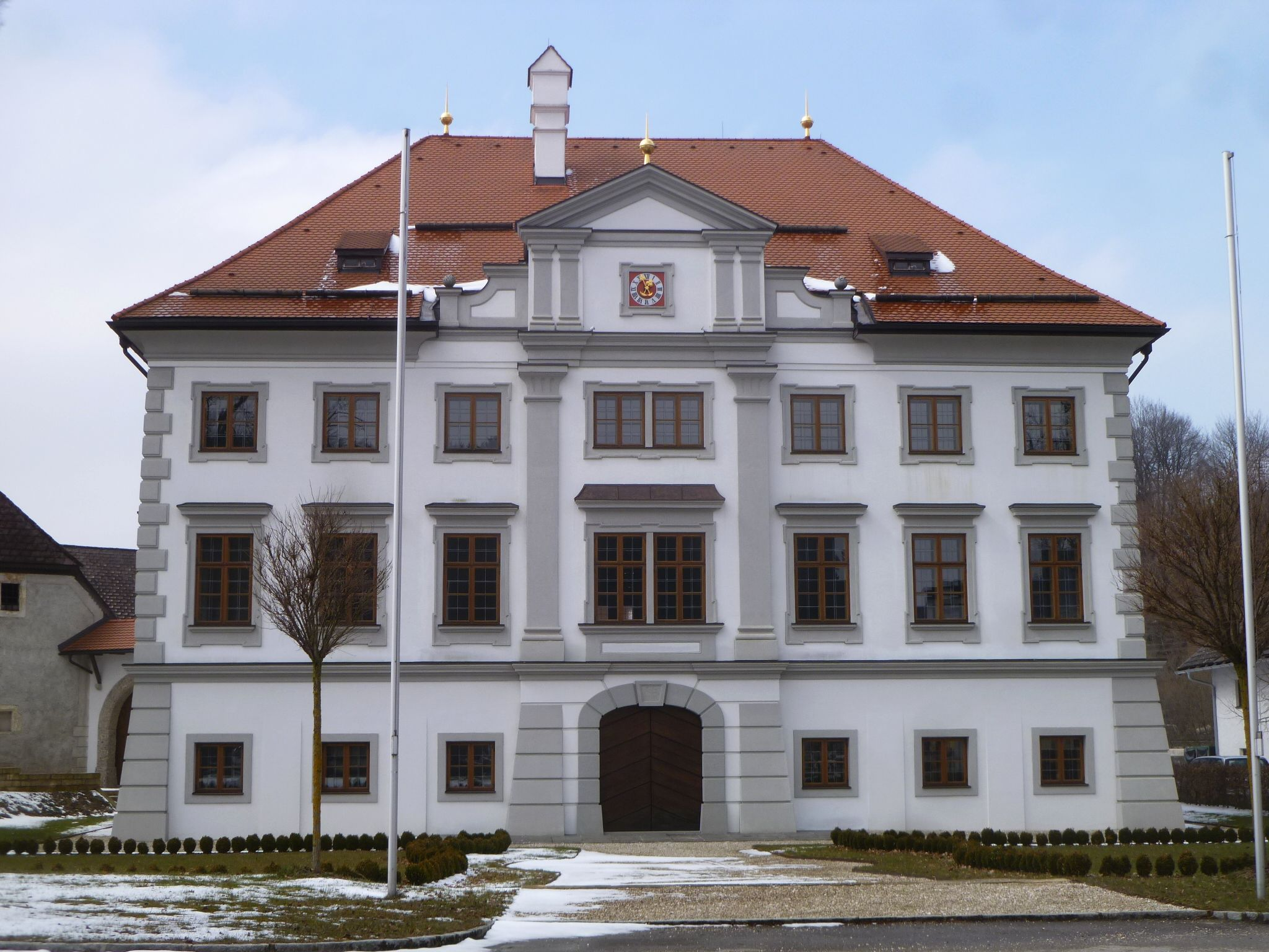 Schloss Stauff heute